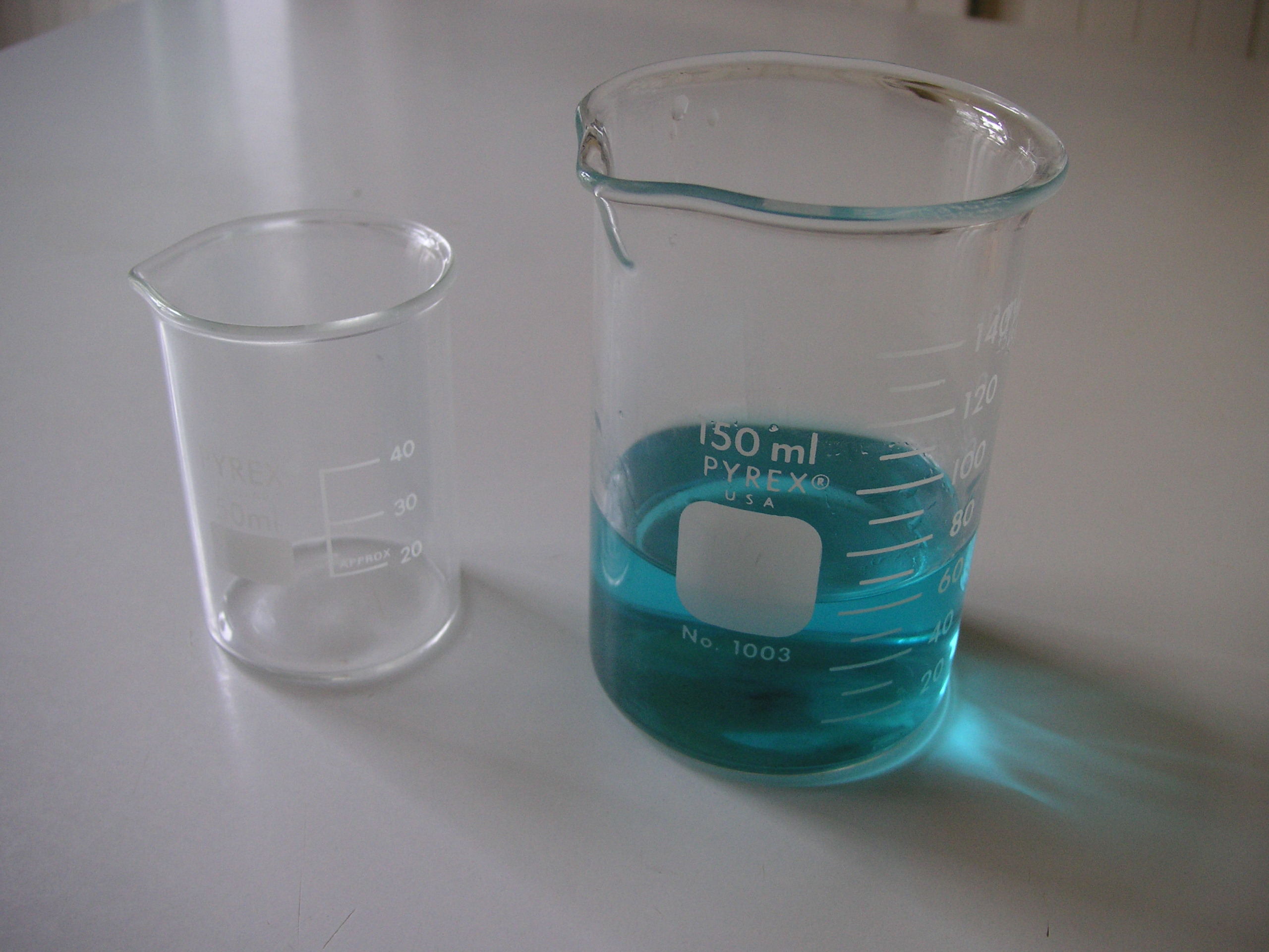 2 béchers Pyrex de 150mL et 50mL